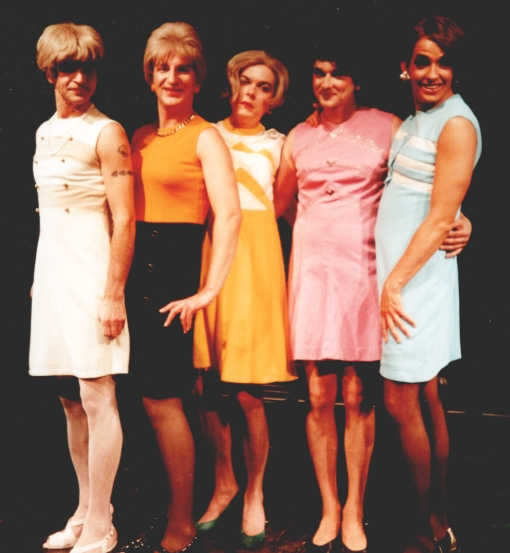 Teufelsberger aus der Bühnenshow "Blusen im Sommerloch" in Berlin. Personen: Ades Zabel (2. v.l.).